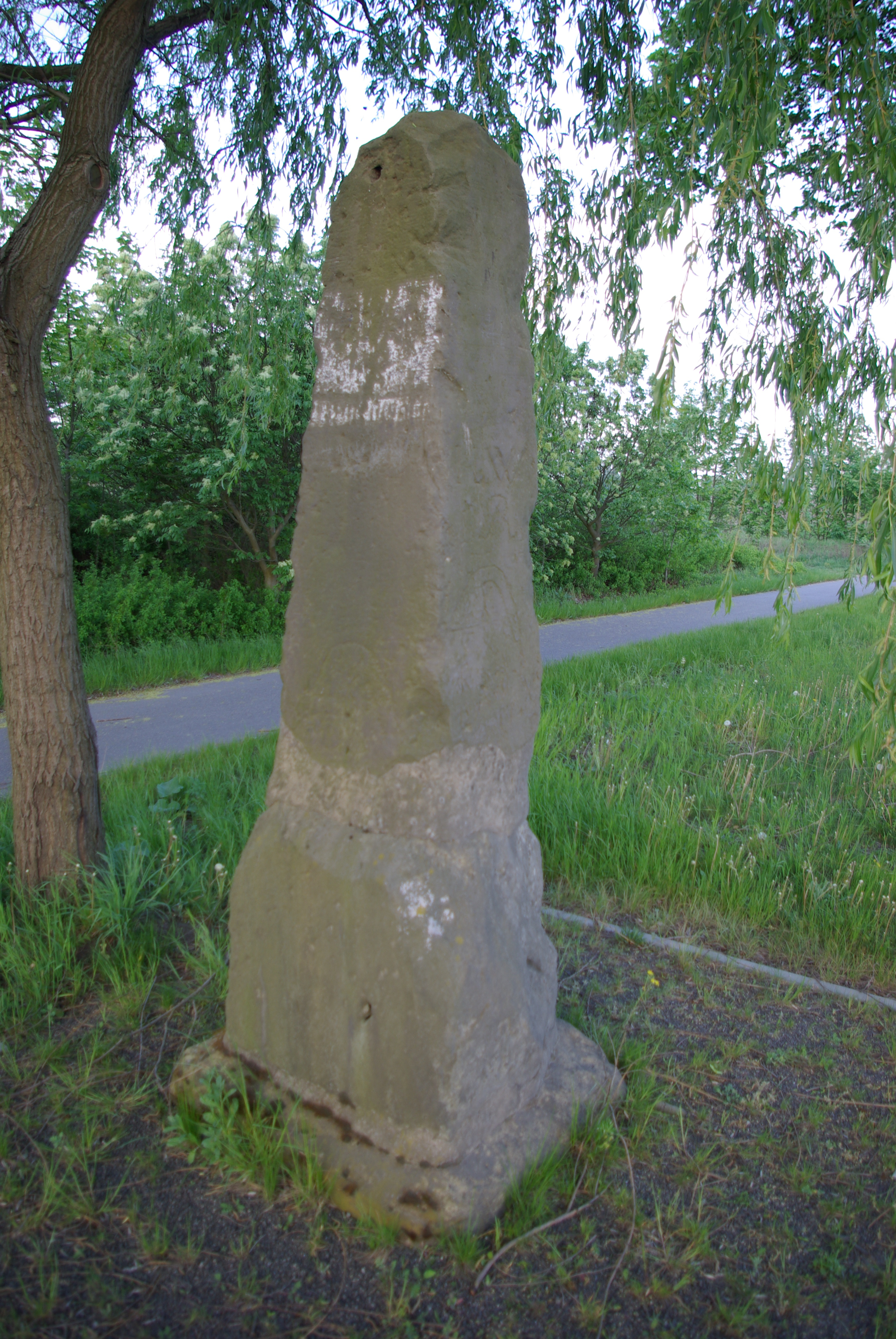 Schönefeld in Brandenburg. Die Postmeilensäule steht an der Straße von Waßmannsdorf nach Klein-Ziethen Richtung Klein-Ziethen rechts an der Straße. Die Säule ist denkmalgeschützt.